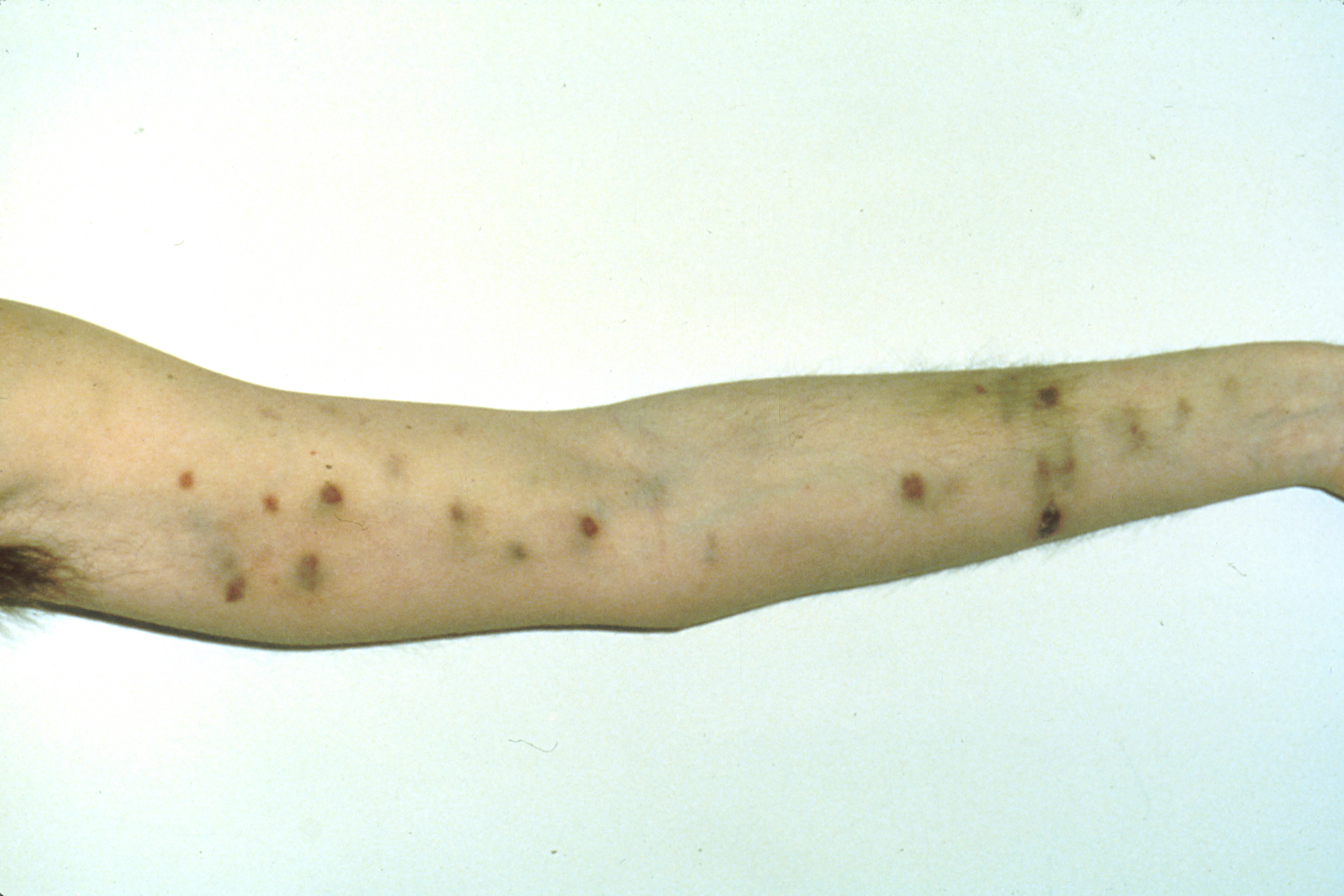 Kaposi's sarcoma on arm